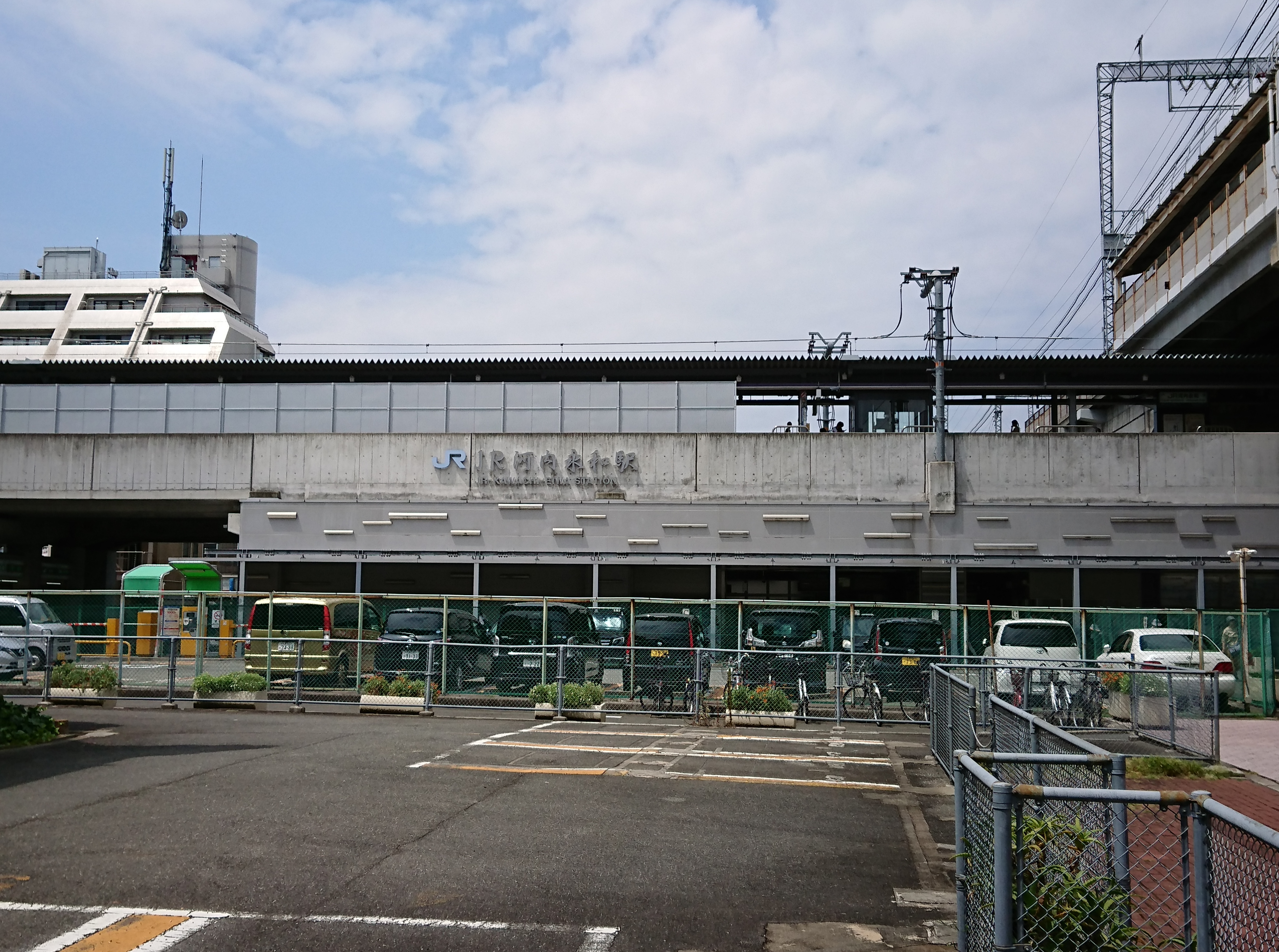 JR河内永和駅の駅舎外観